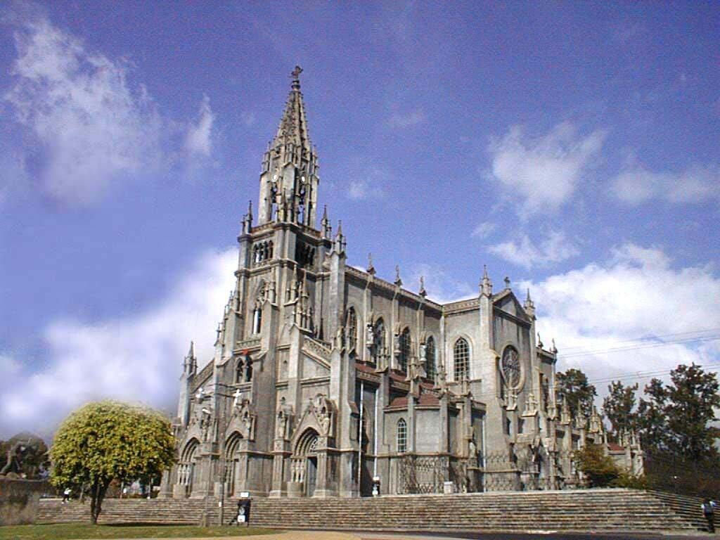 Esta es una foto de la Iglesia gótica construida en el cantón Vásquez de Coronado en Costa Rica